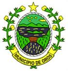 Brasão do Município de Orós, Ceará, Brasil